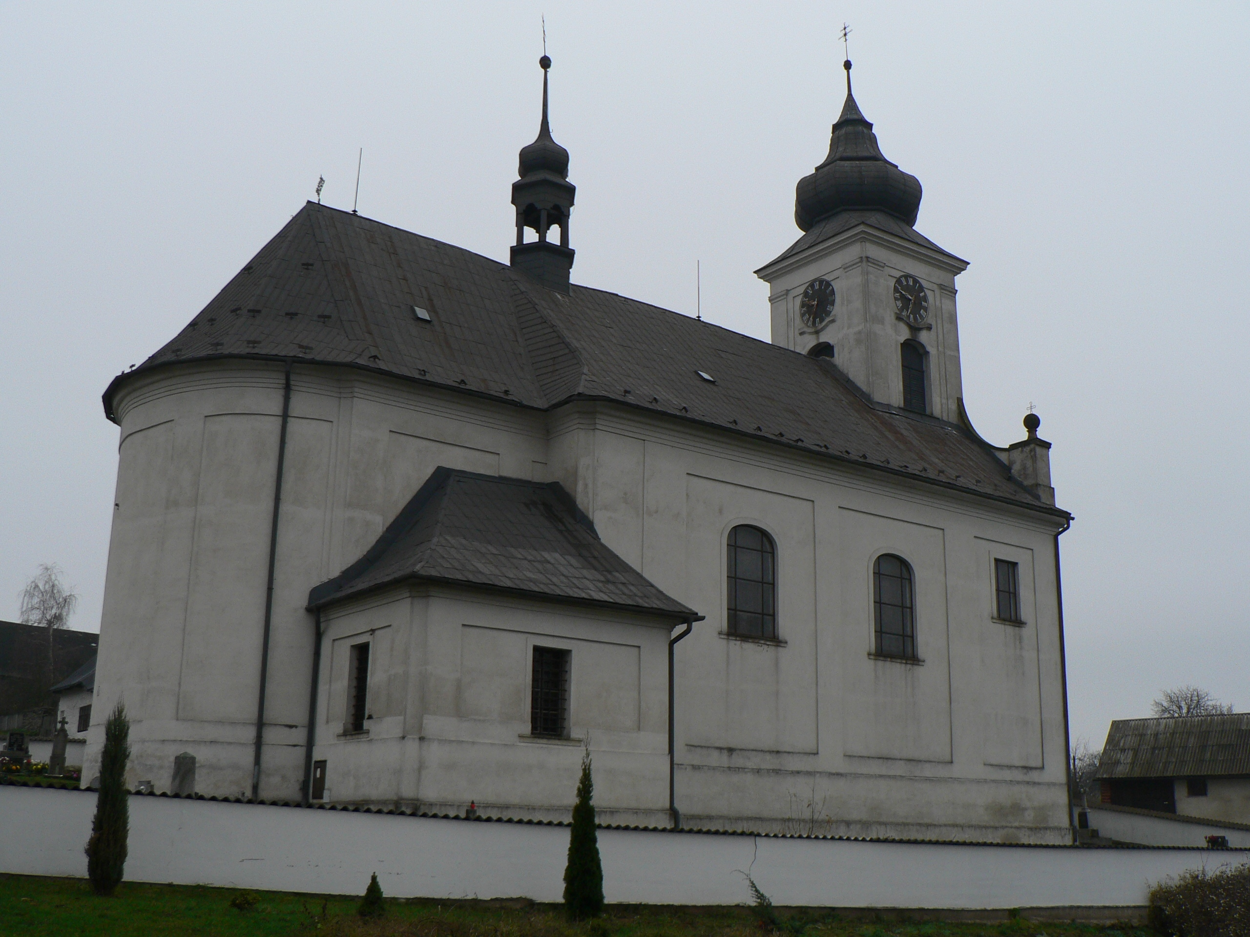 Kostel svatého Mikuláše (Mladoňov)